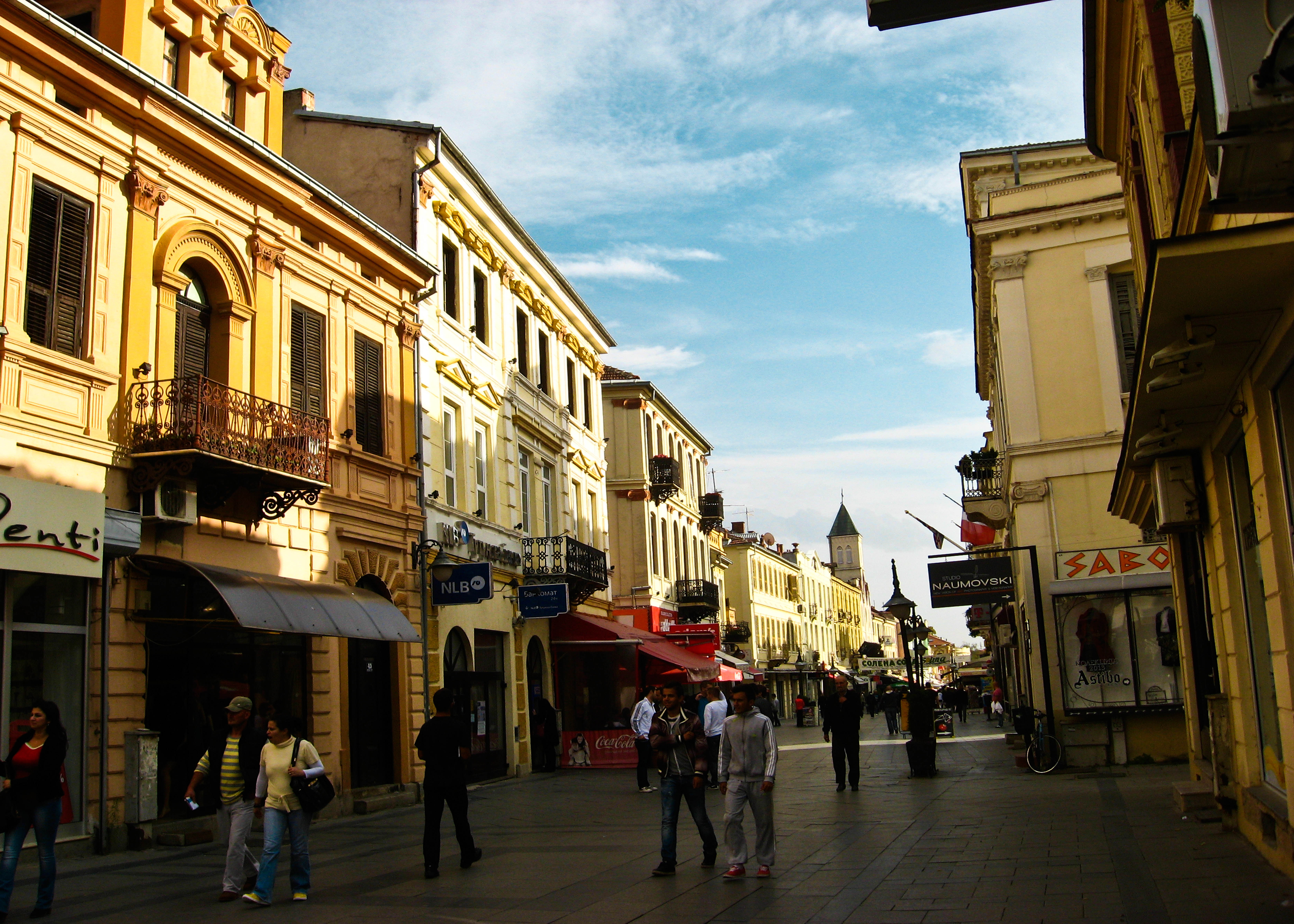 Широк сокак, Битола